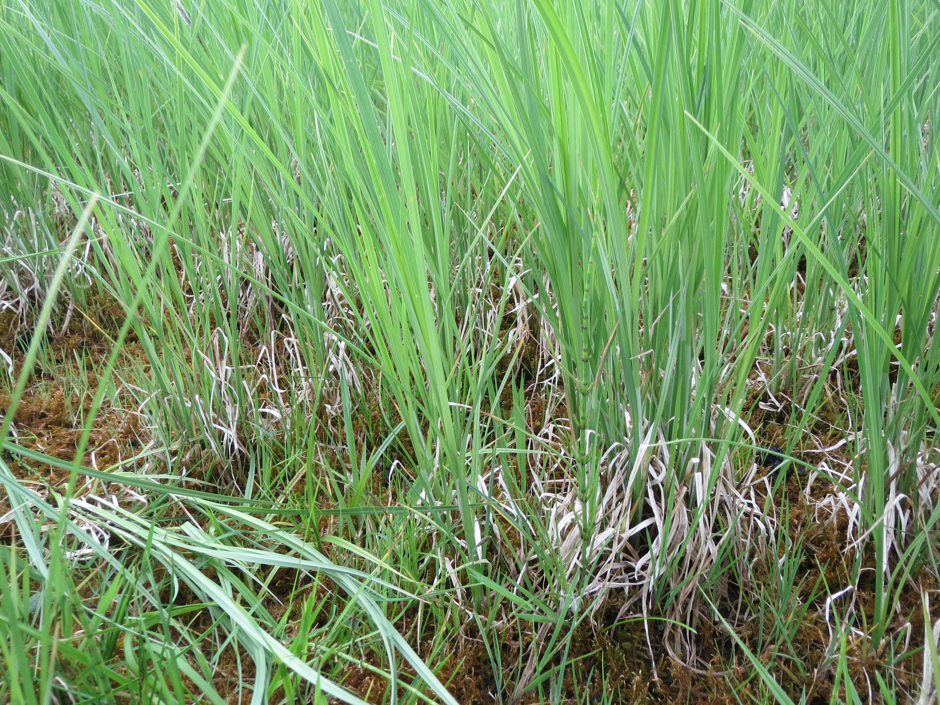 Schlank-Segge (Carex acuta) in den Horststückern (Hockenheimer Rheinbogen)